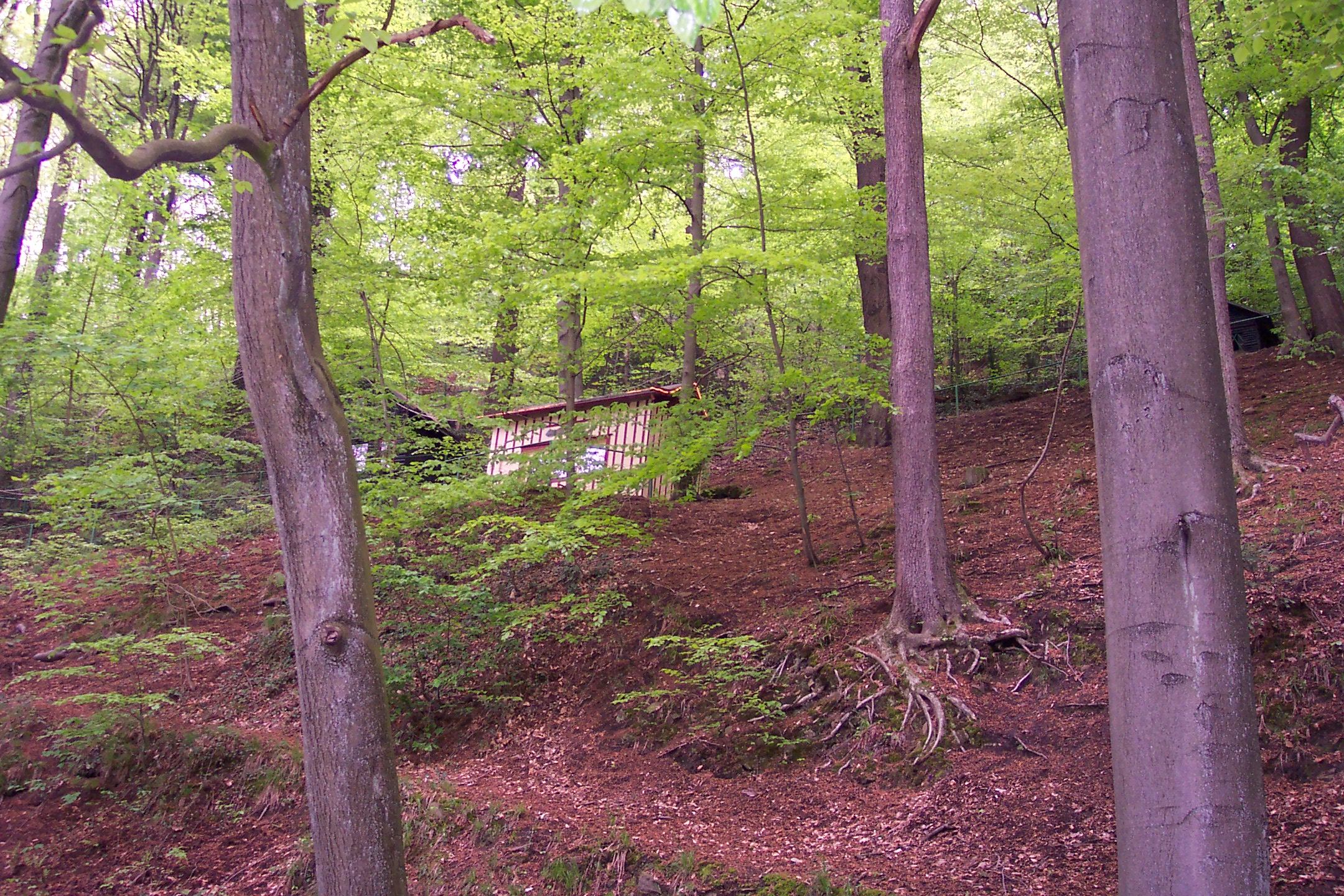 Im Ittertal, Solingen